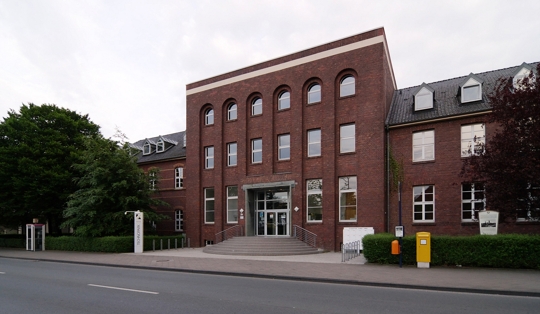 Ehemaliges Verwaltungsgebäude der Zeche Monopol in Kamen. Der größte Teil des Komplexes existiert nicht mehr. Das Zechengelände ist weitgehend in ein Gewerbegebiet umgewandelt worden.